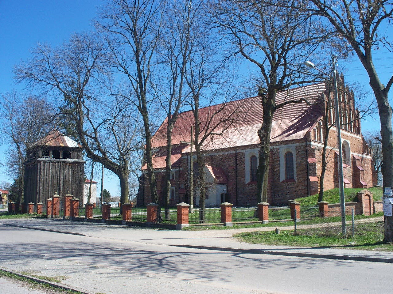 Rosochate Kościelne - kościół par. p.w. św. Doroty, mur. (1546). Widoczna jest również barokowa drewniana dzwonnica (zabytek nr rejestr. 8/42)